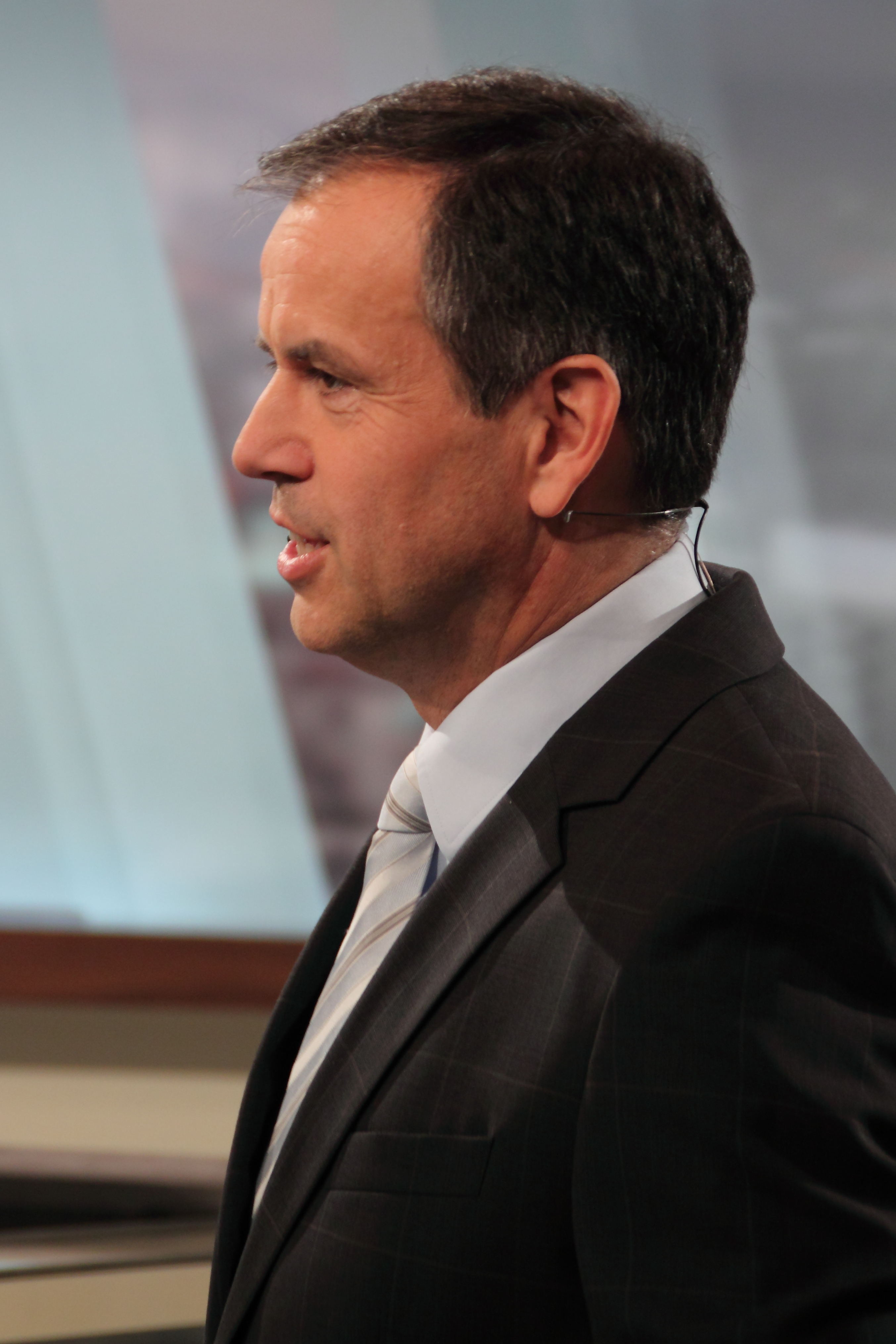 Landtagswahl in Niedersachsen 2013